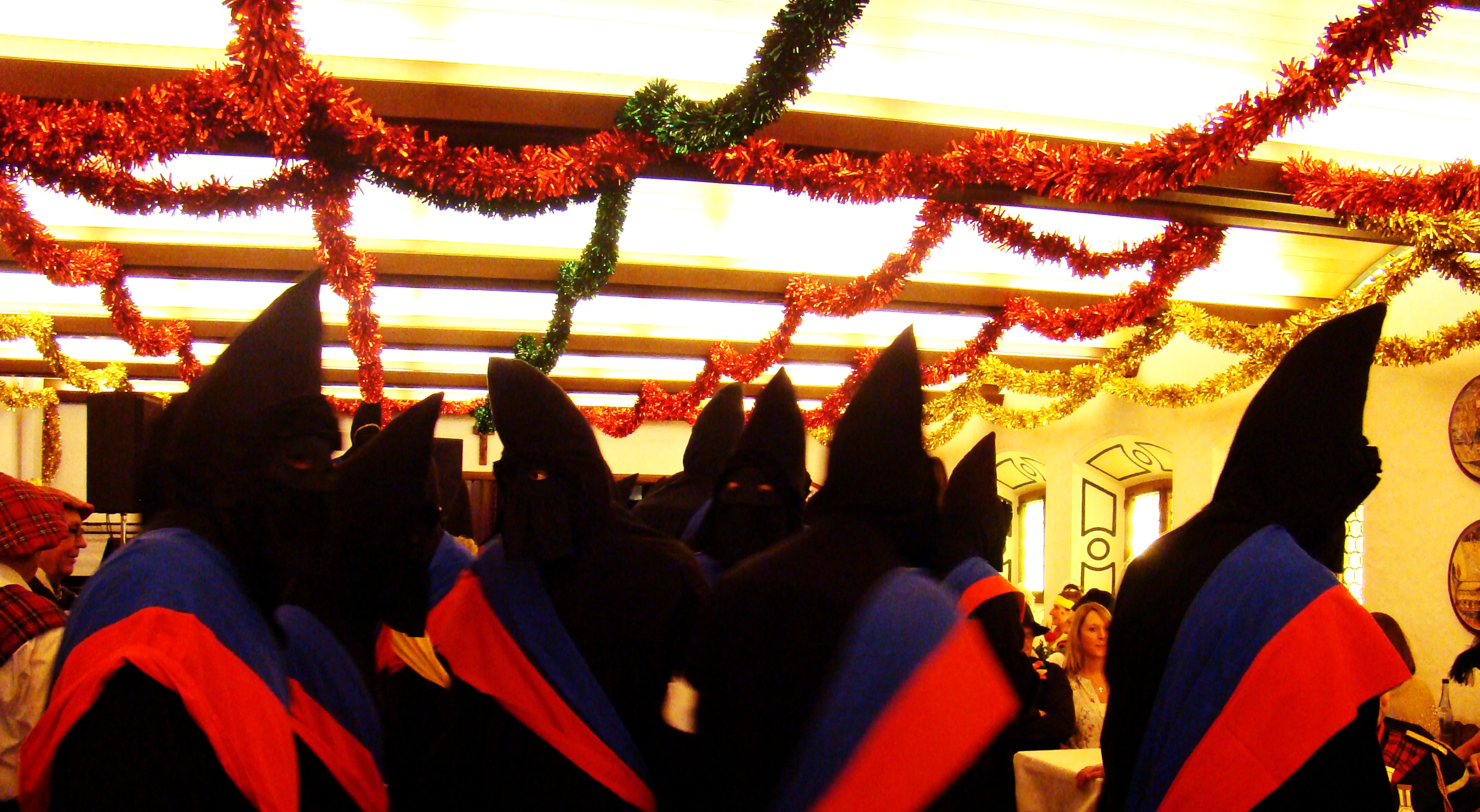 Mitglieder der Pennäler Schnitzelbank im Gasthaus Roter Ochsen